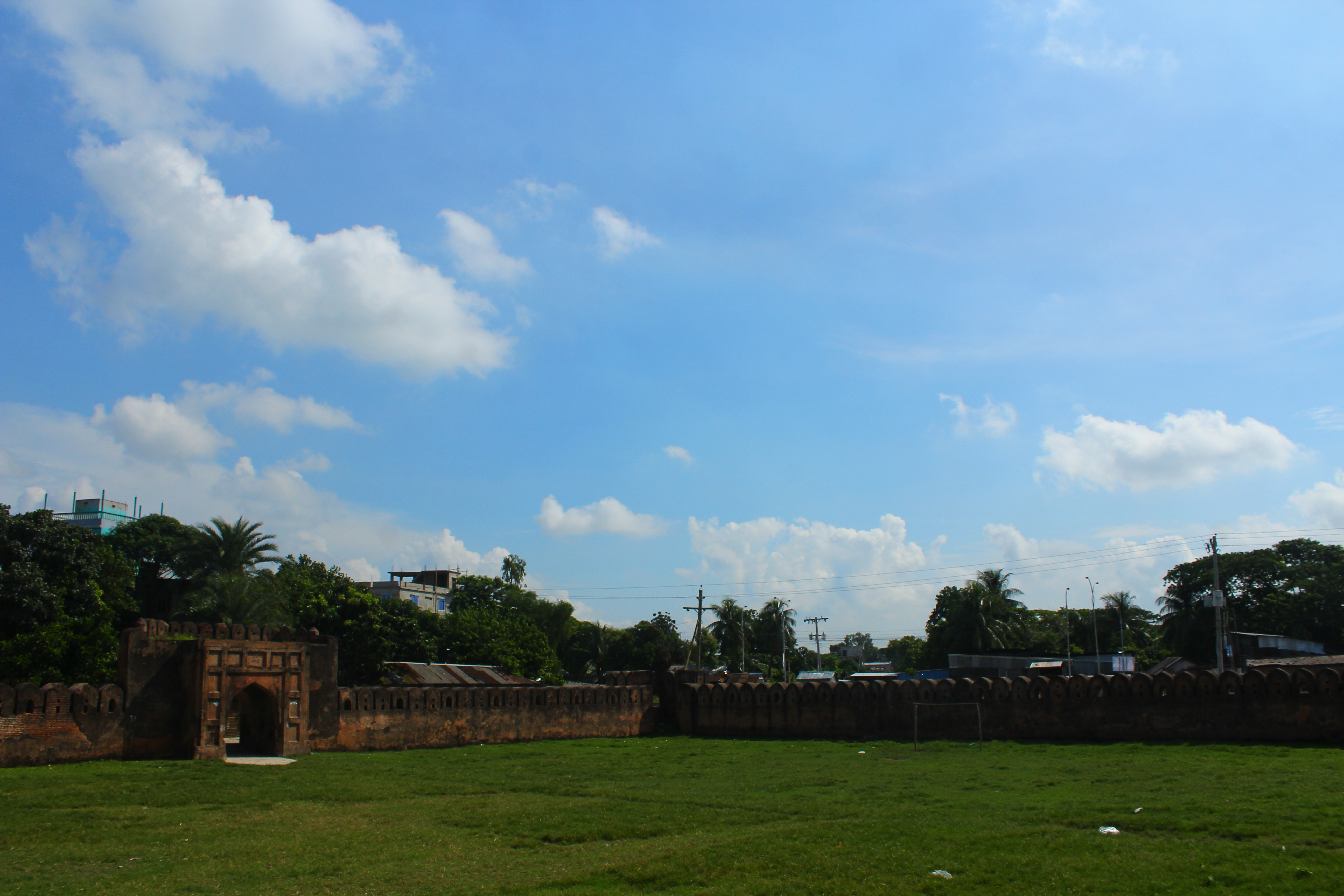 সোনাকান্দা দুর্গ